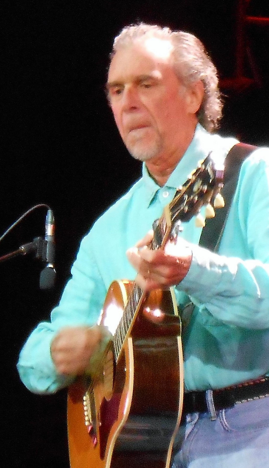 Zachary Richard a offert une performance aux FrancoFolies de Montréal, le 19 juin 2013, à la place des Festivals.